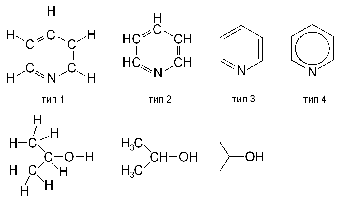 Типы структурных формул